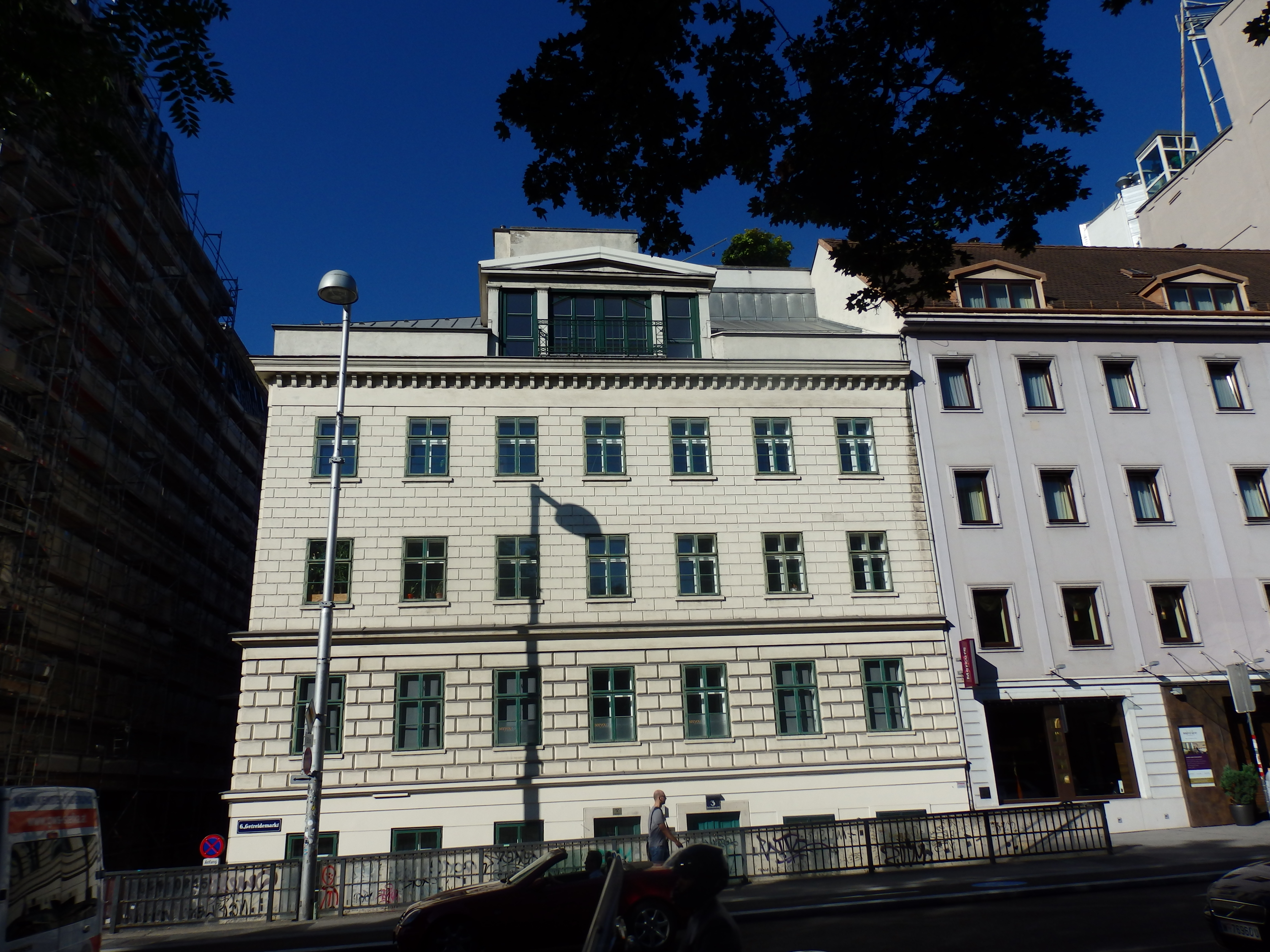 Geburtsthaus von Ferdinand von Saar, Getreidemarkt 3 (1787), Wien-Mariahilf